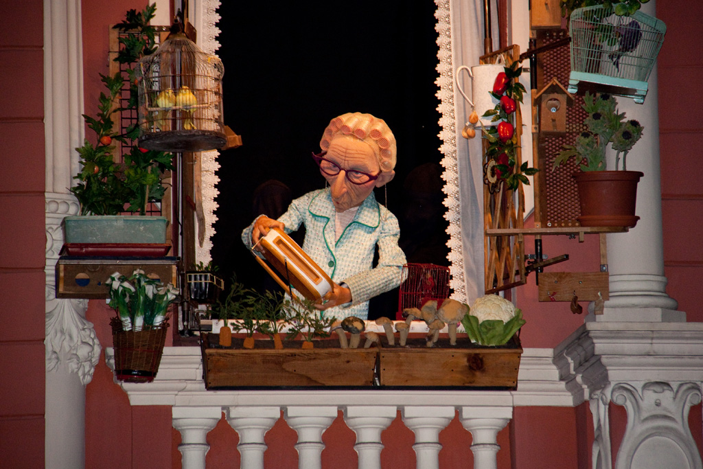 Peça de teatro de bonecos "Menus larcins", do grupo francês Délit de façade, realizado na Praça da Liberdade em Belo Horizonte, durante o Festival Internacional de Teatro, Palco e Rua (FIT-BH).